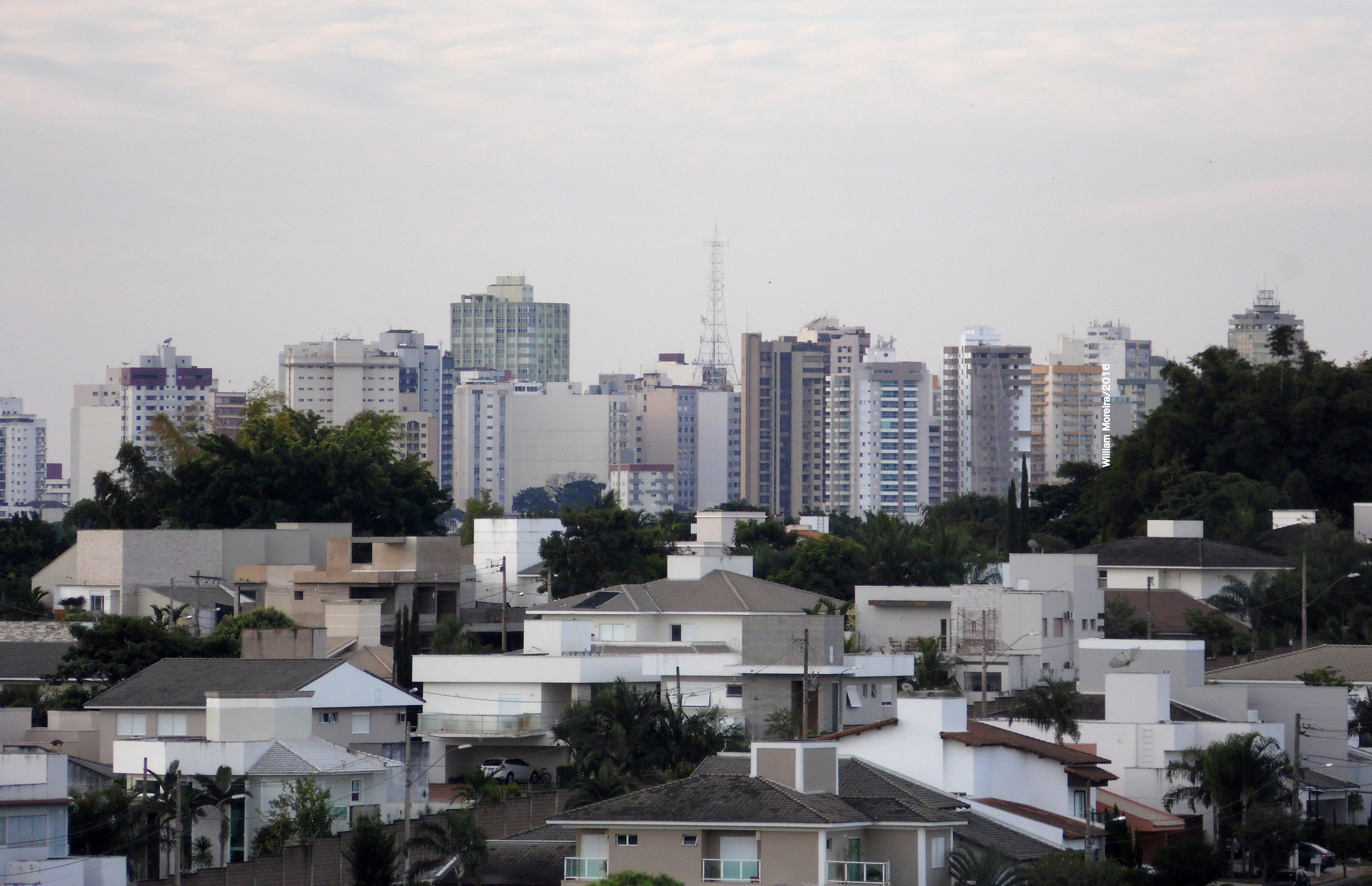 Zonas Central e Sul de Uberlândia.